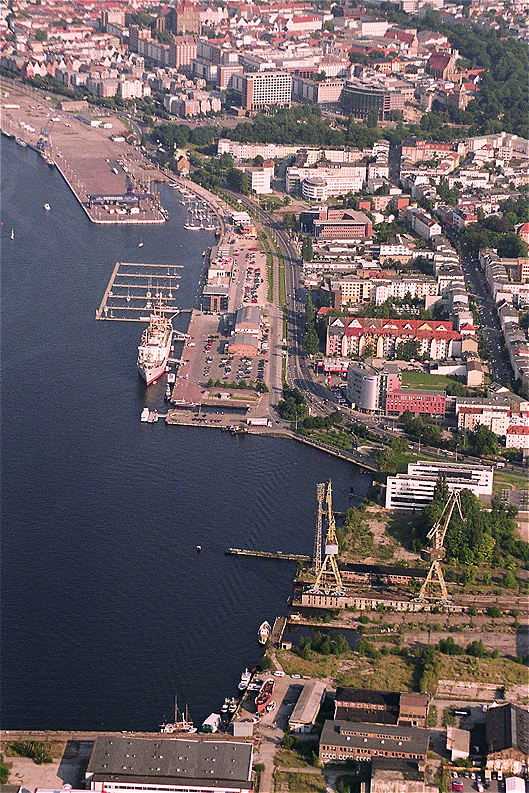 Rostocker Stadthafen und Innenstadt